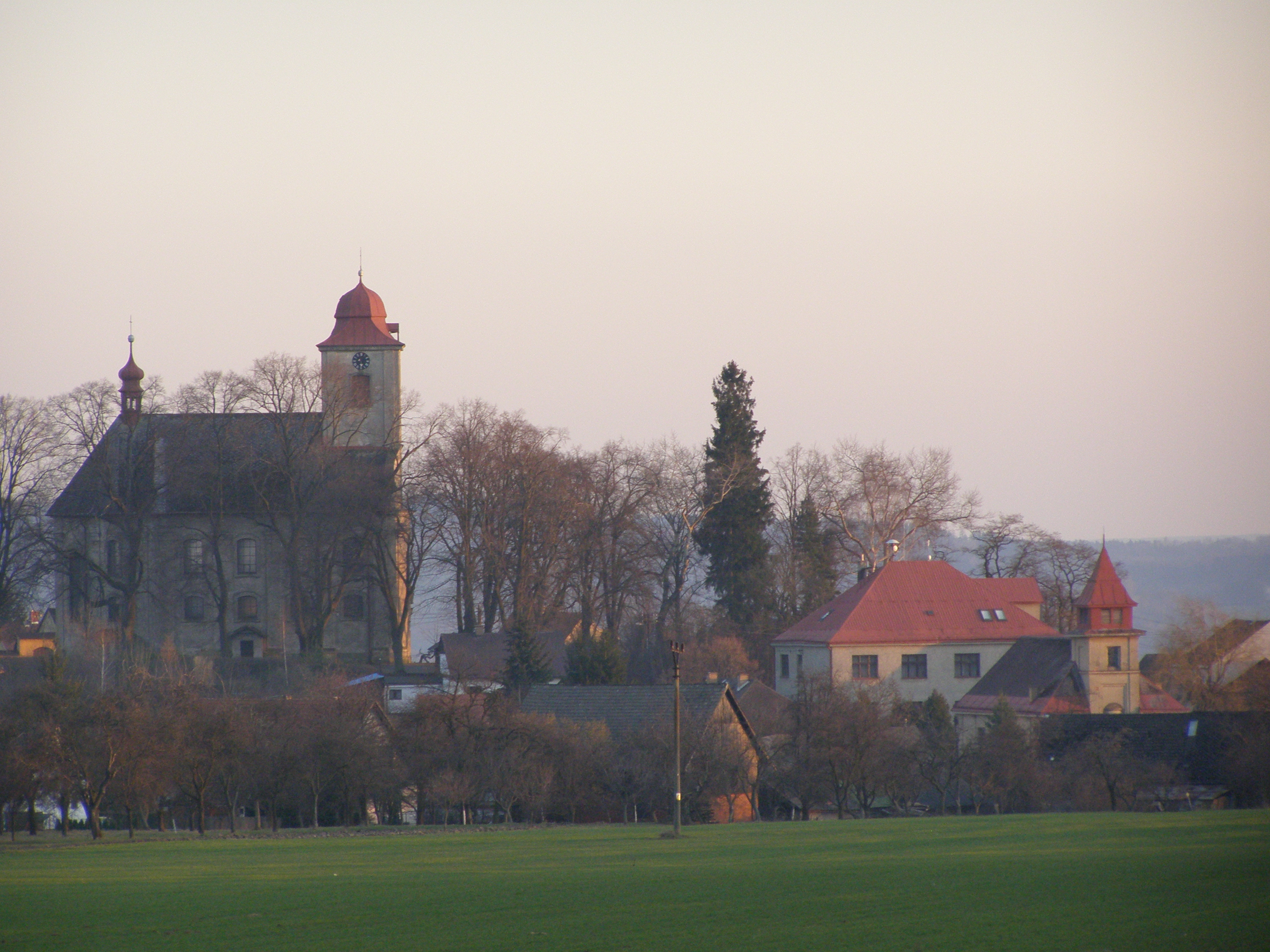 Panorama – Jenišovice u Jablonce nad Nisou – kostel sv. Jiří a mateřská škola